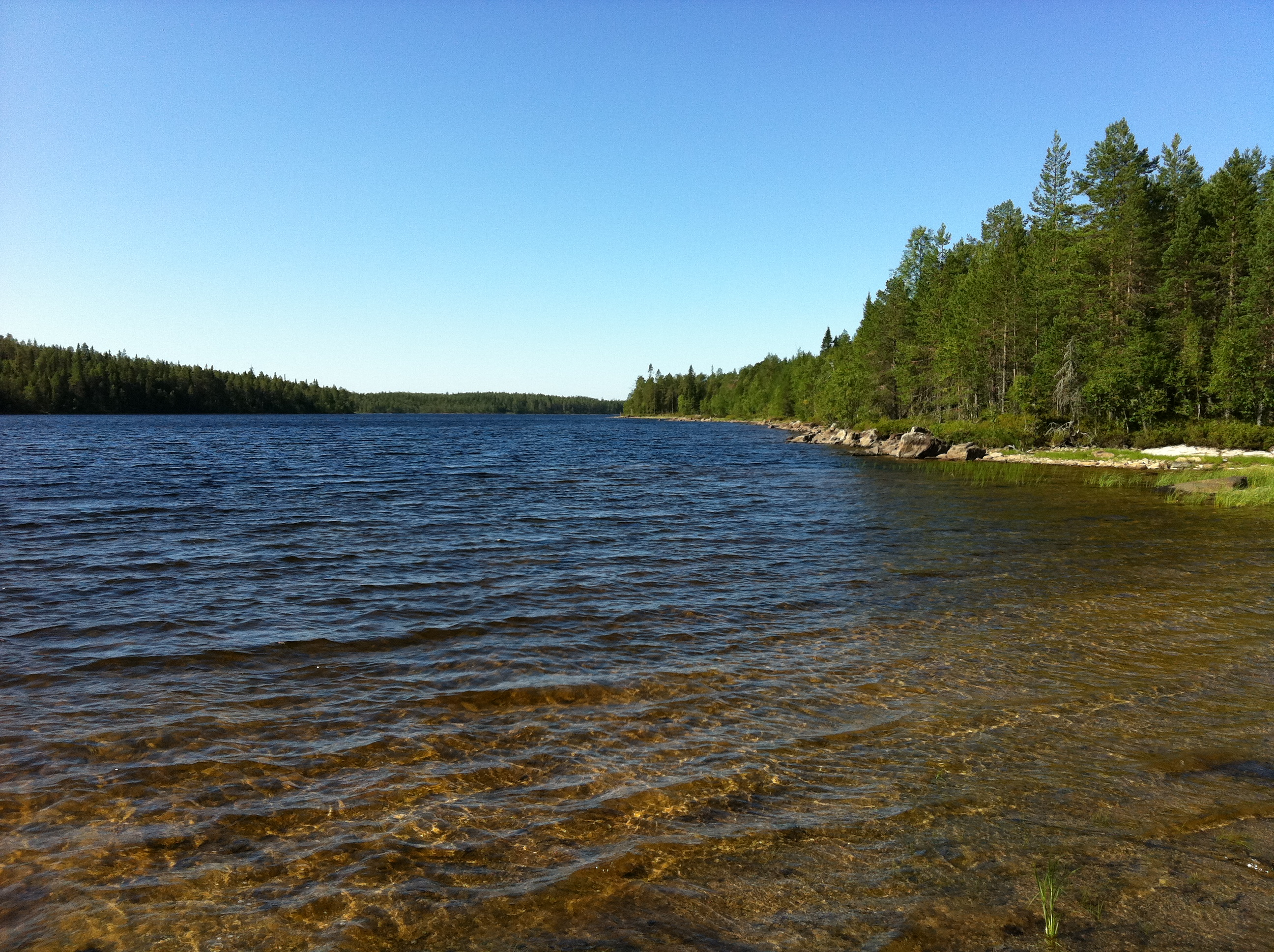 Топозеро-залив Ламбашгуба